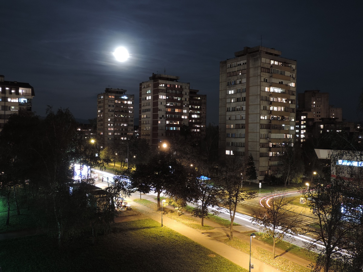 Pogled na solitere u Banjalučkom naselju Borik